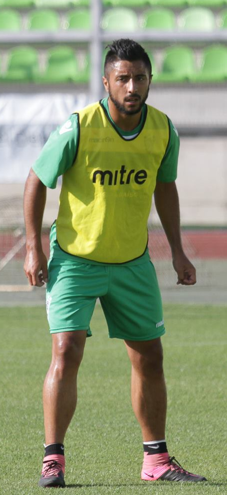 Fotografía del jugador de fútbol Fabian Pavez en el Santiago Wanderers.